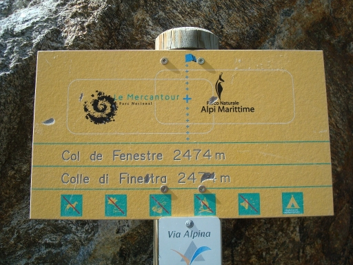 Col de Fenestre, Parc national du Mercantour, Alpes-Maritimes